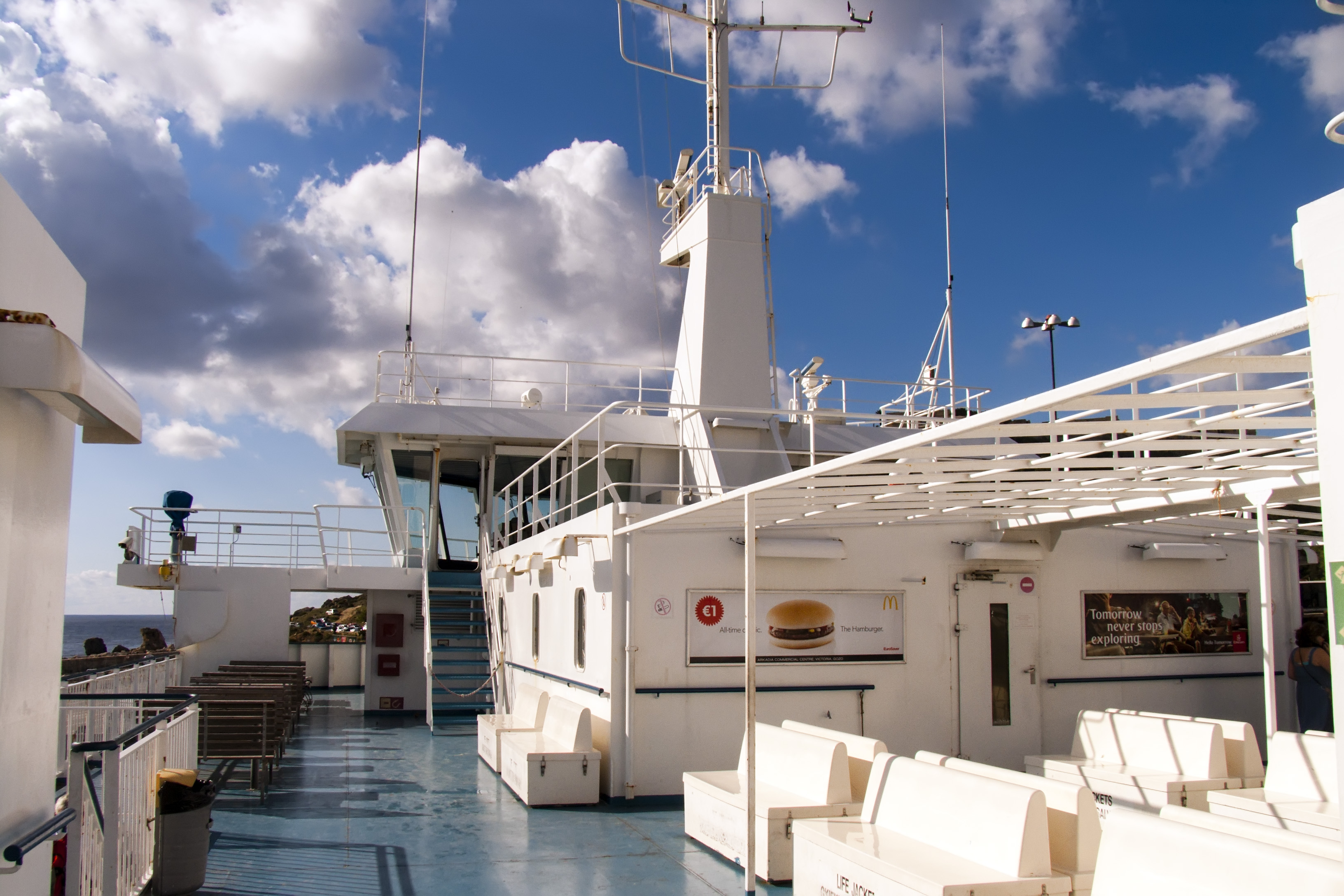 Паром "Malita". Верхняя палуба.